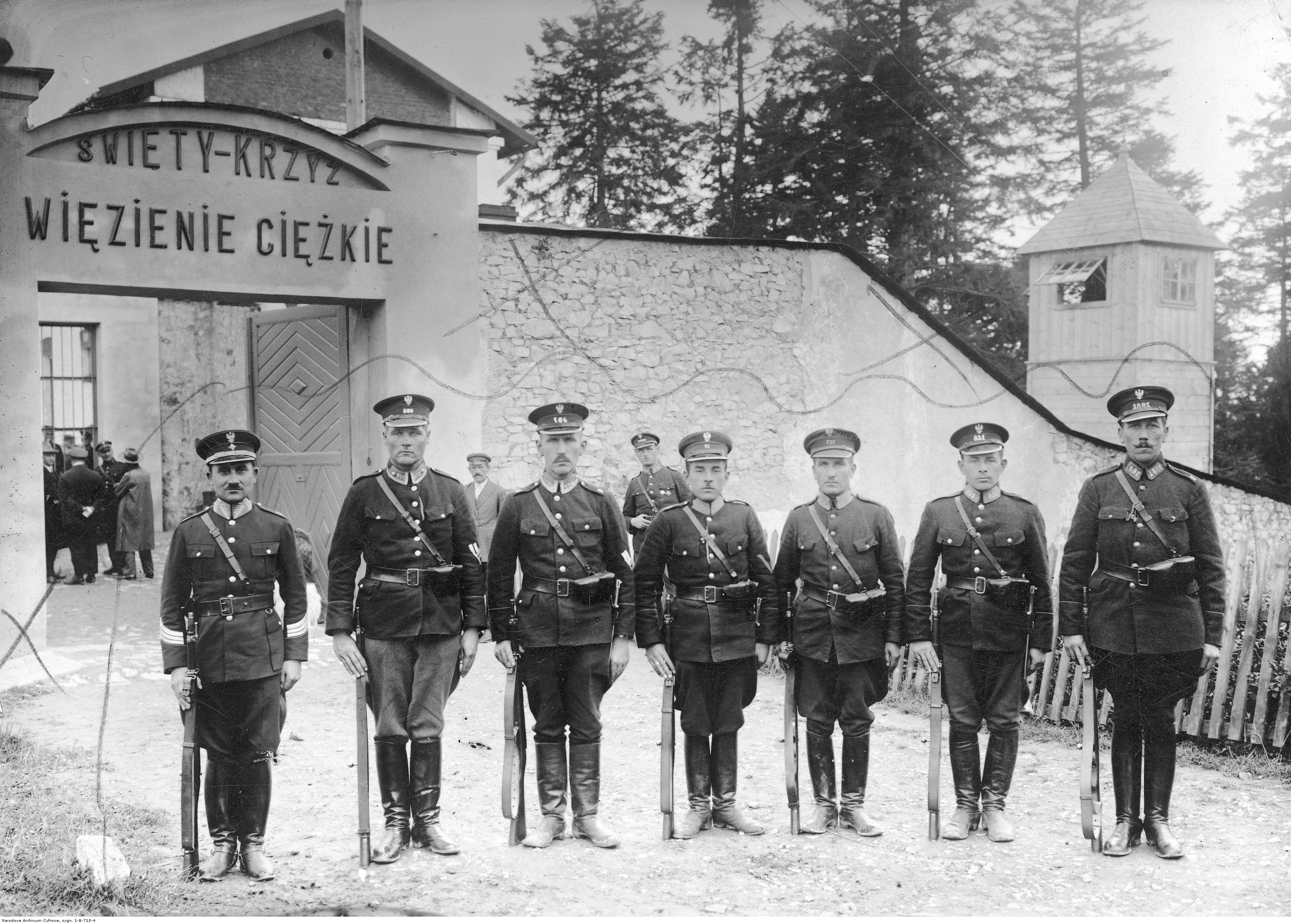 Bunt więźniów w Wiezieniu Ciezkim na Swietym Krzyzu